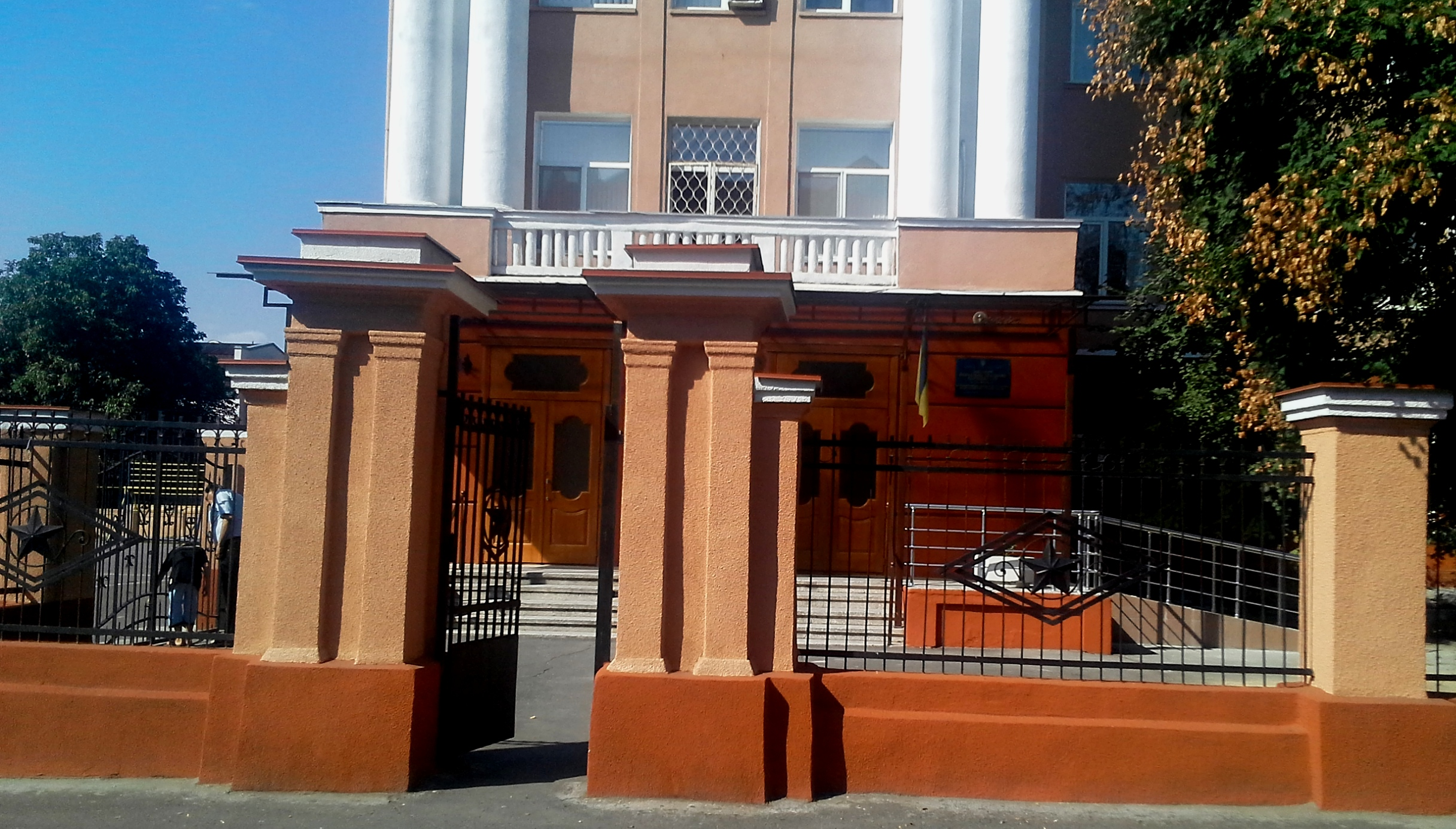 Головний вхід до школи № 90